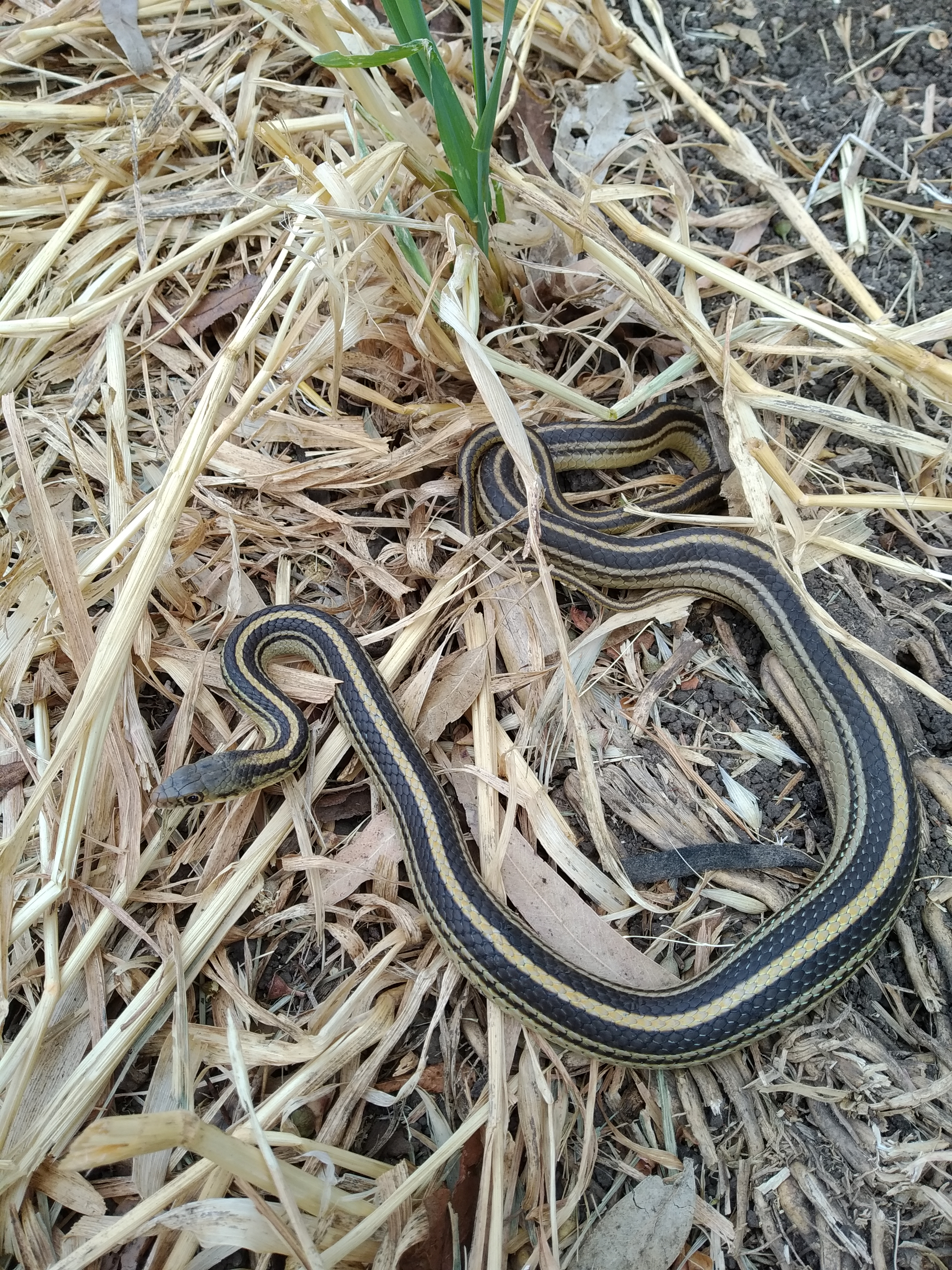 Salvadora grahamiae